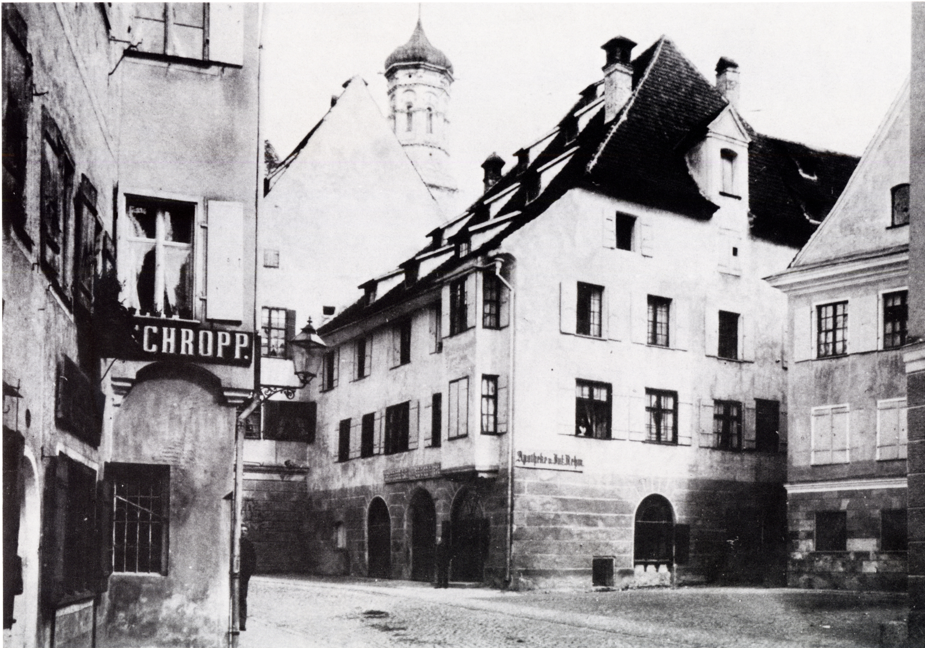 Elefantenapotheke im oberschwäbischen Memmingen. Blick aus der Kalchstraße, Zustand vor 1894